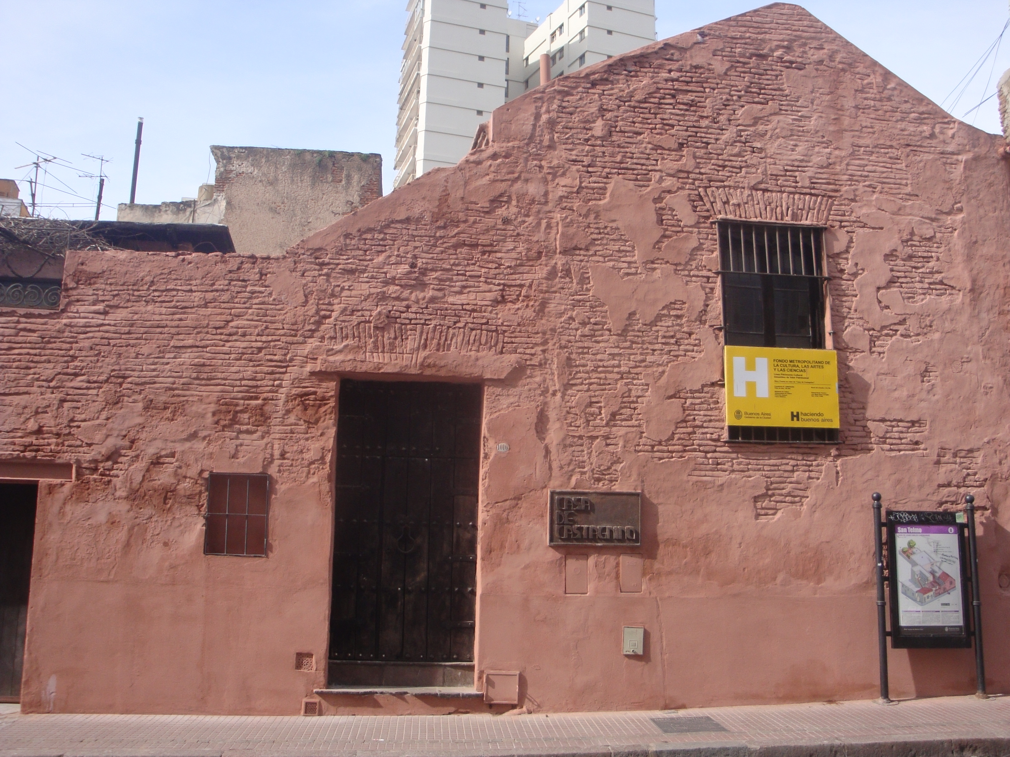 Casa del artista Juan Carlos Castagnino ubicada en la calle Balcarce 1016 del barrio de San Telmo, Buenos Aires.